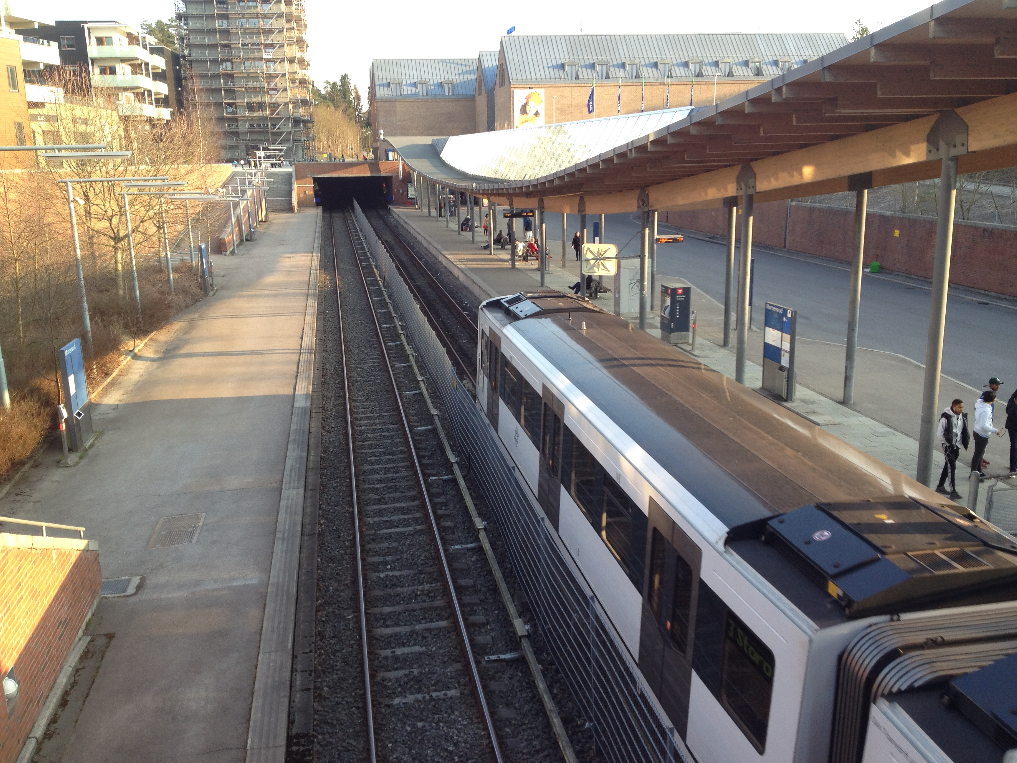 Mortensrud stasjon